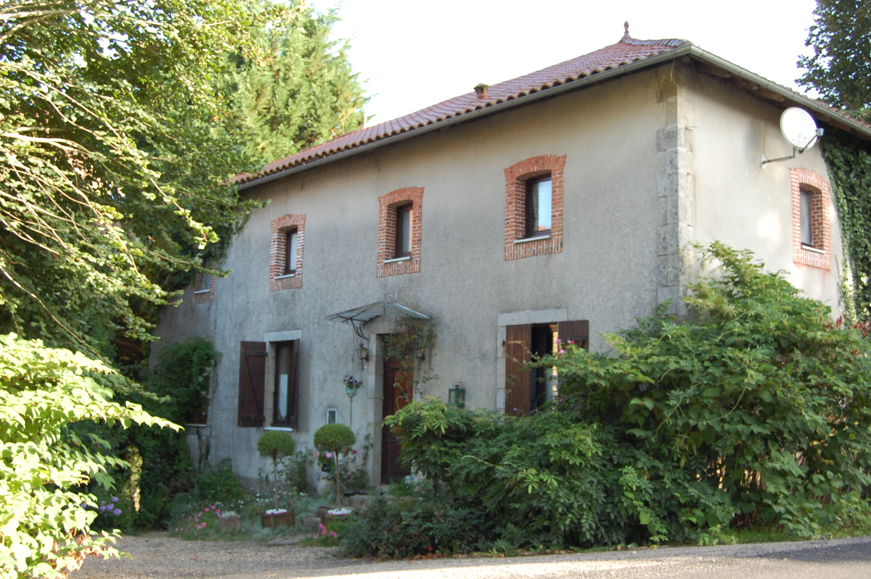 Châlus Les Gannes